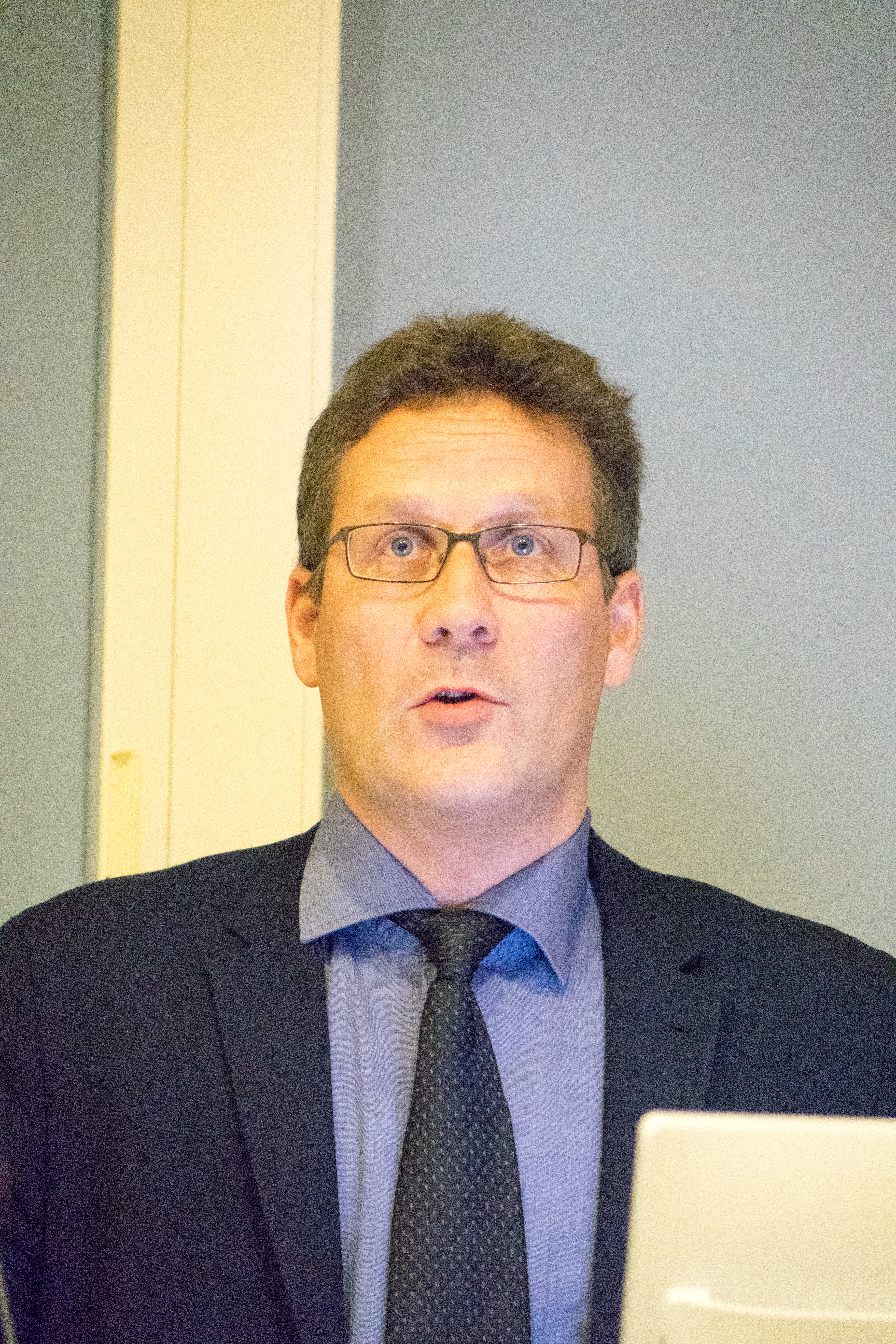 Vesa Vares